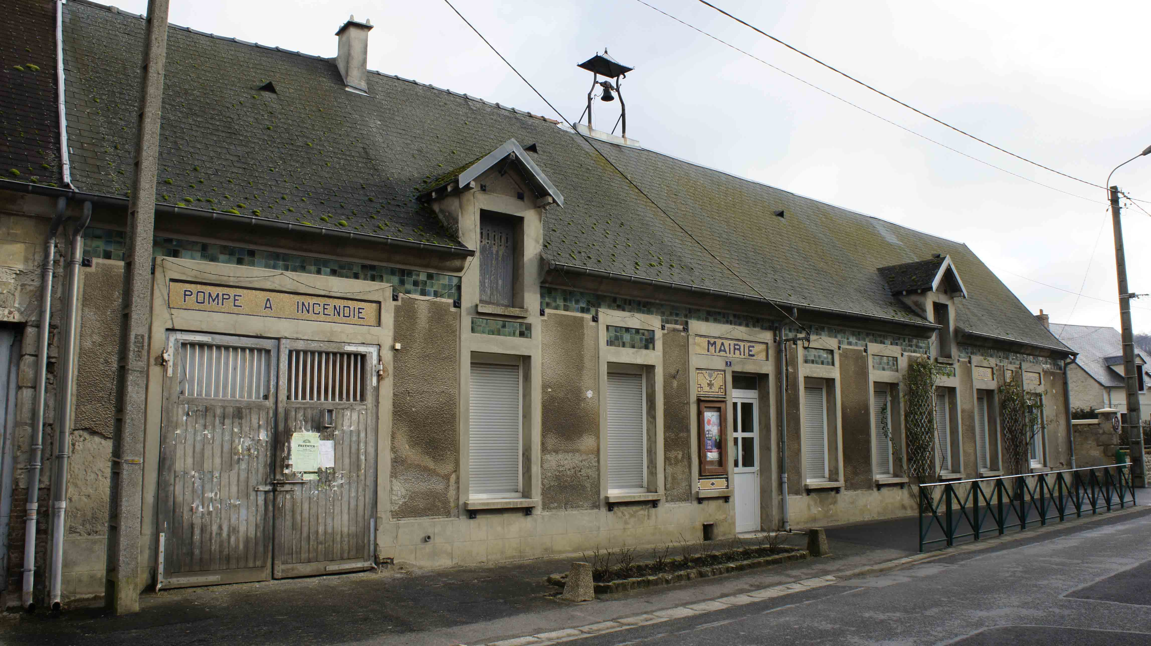 Ancienne école mairie poste à incedie de Festieux.